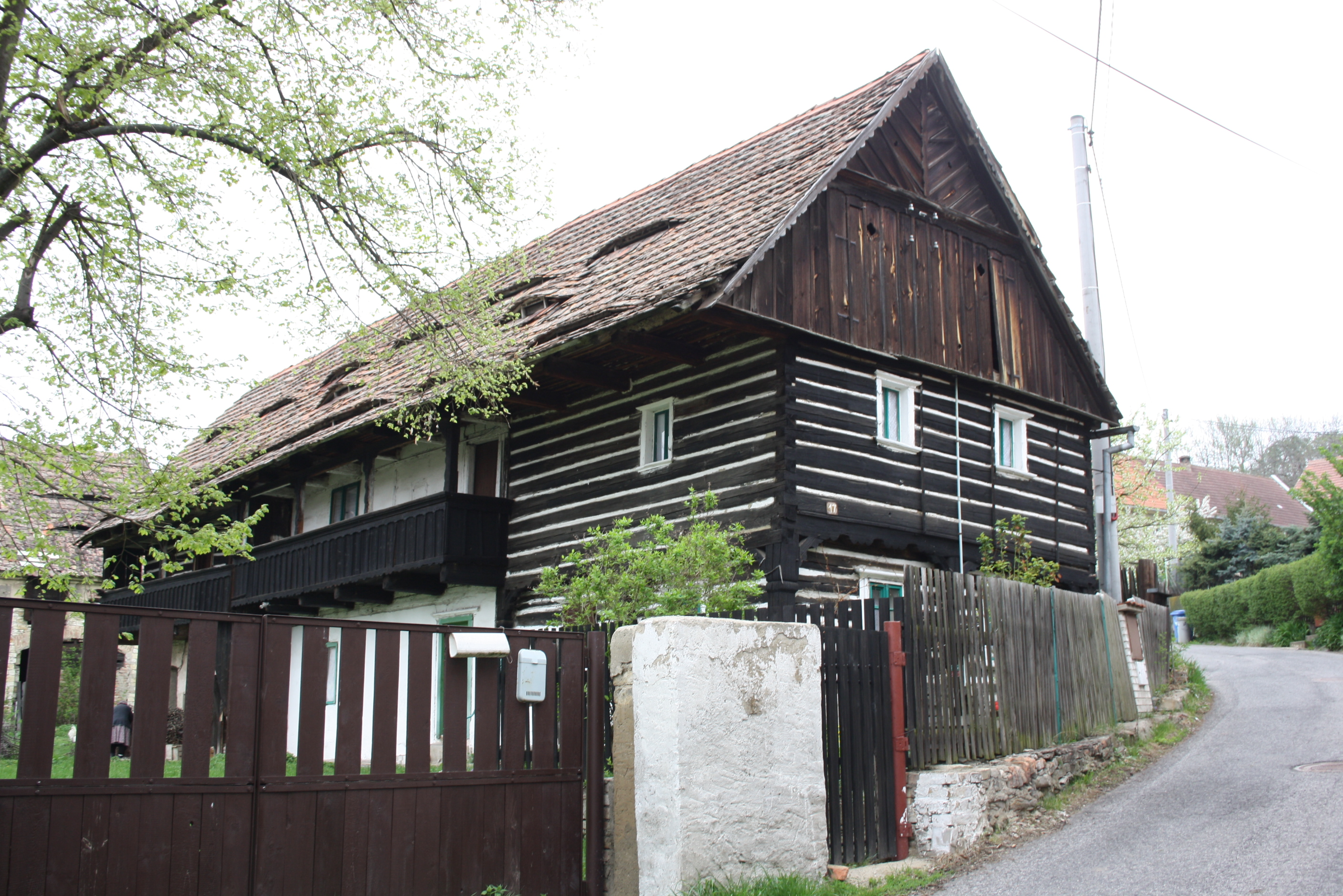 Dům číslo popisné 17 v Encovanech.